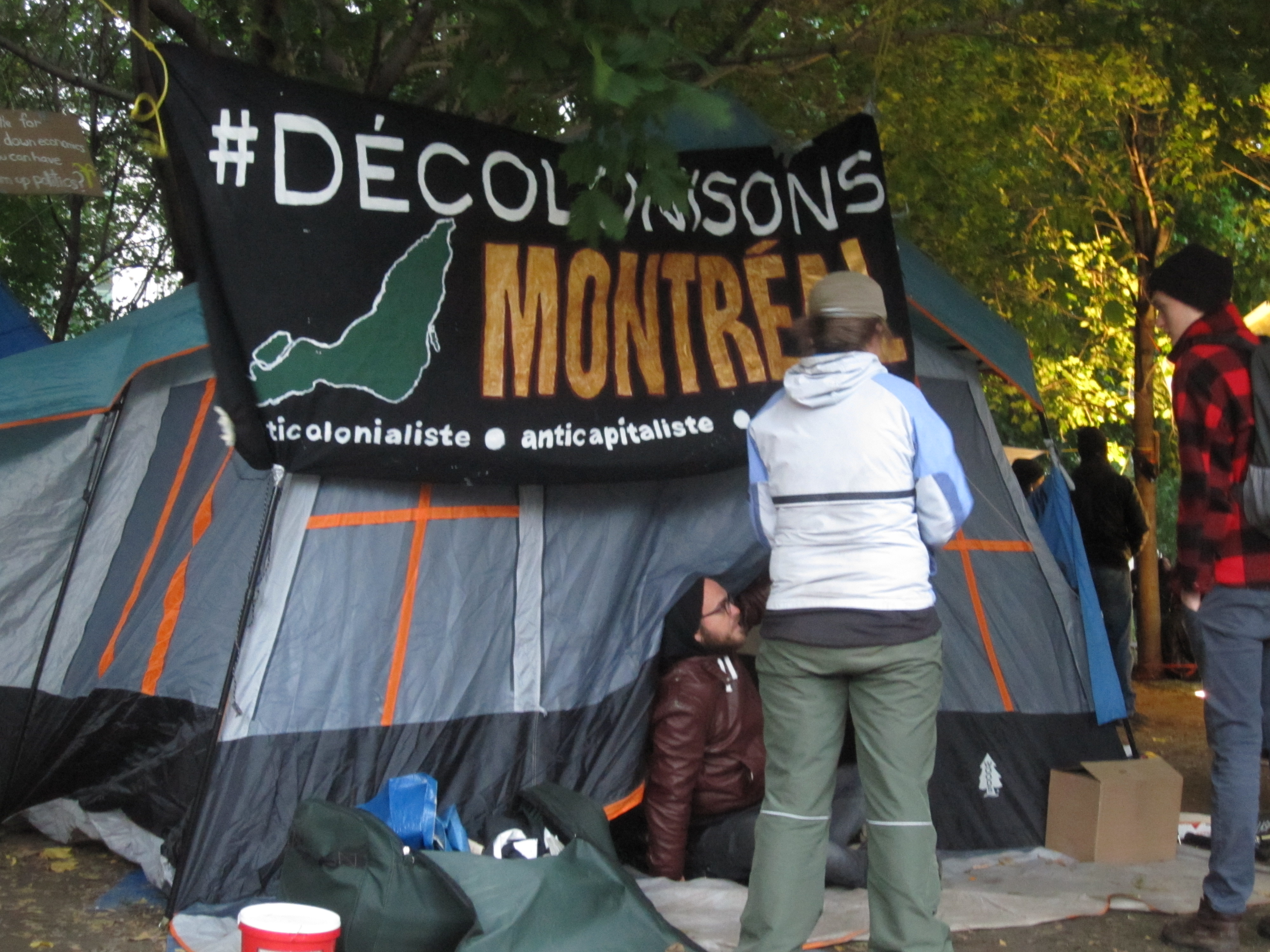 Photo d'Occupons Montréal, inspiré de Occupy Wall Street. Les manifestants occupent le Square Victoria.